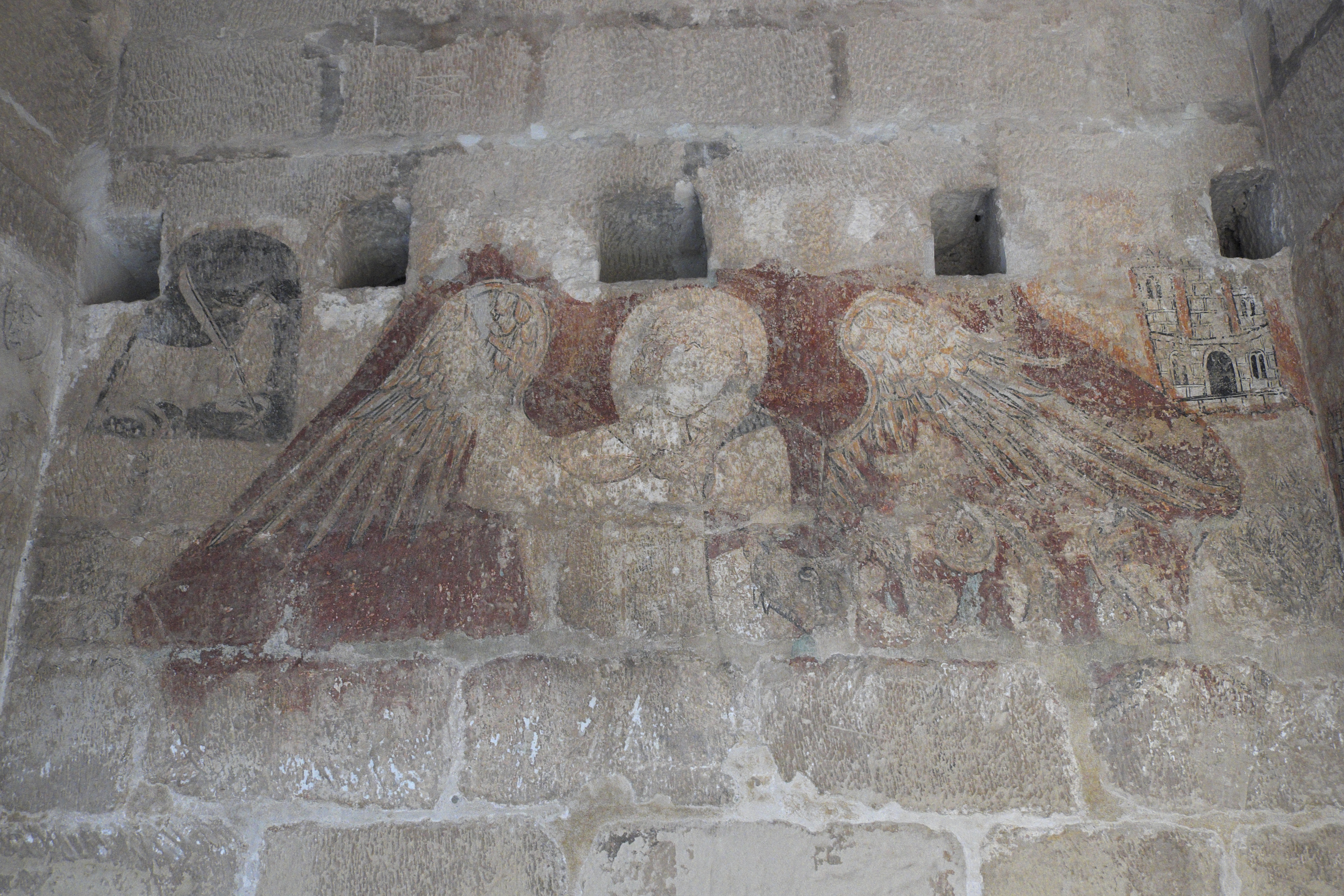 Castillo-Convento von Alcañiz in der Provinz Teruel (Aragonien/Spanien), Wandmalerei im Kreuzgang; Darstellung: Erzengel Michael